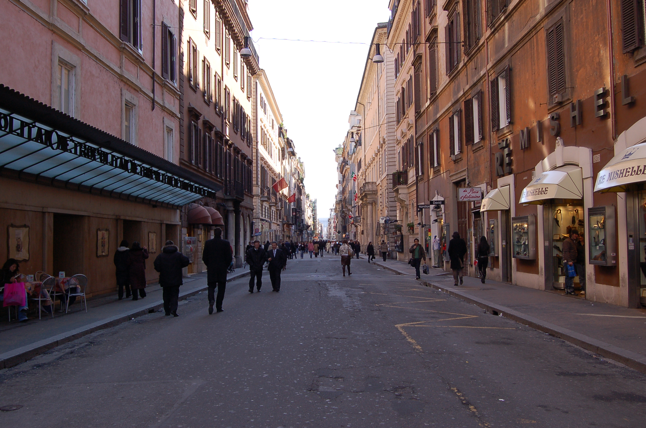 Roma, Italia